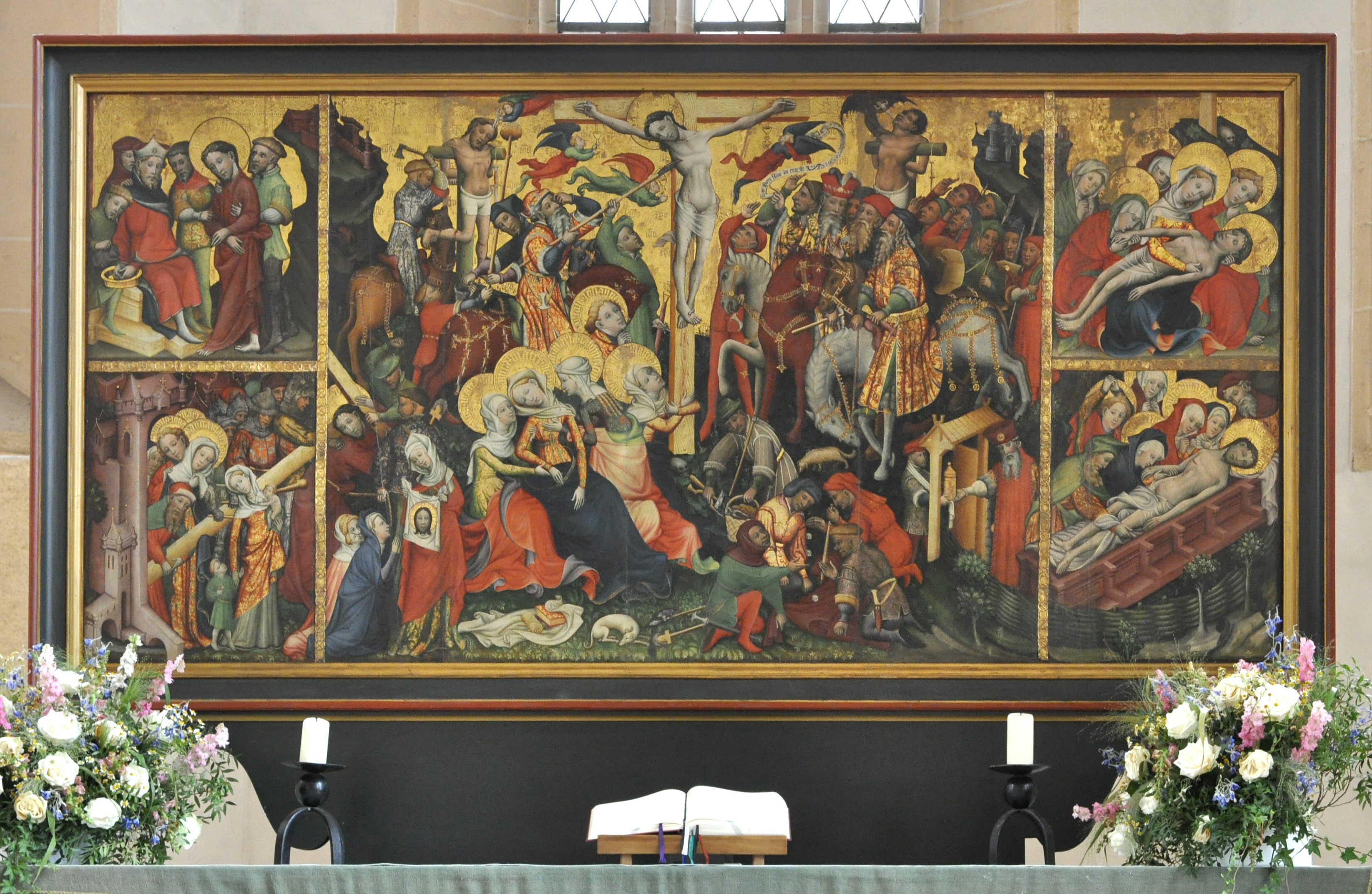 Retabel des Peter-und-Paul-Altares, anonym 1. Viertel des 15. Jahrh. in der St.-Lamberti-Kirche (Hildesheim).